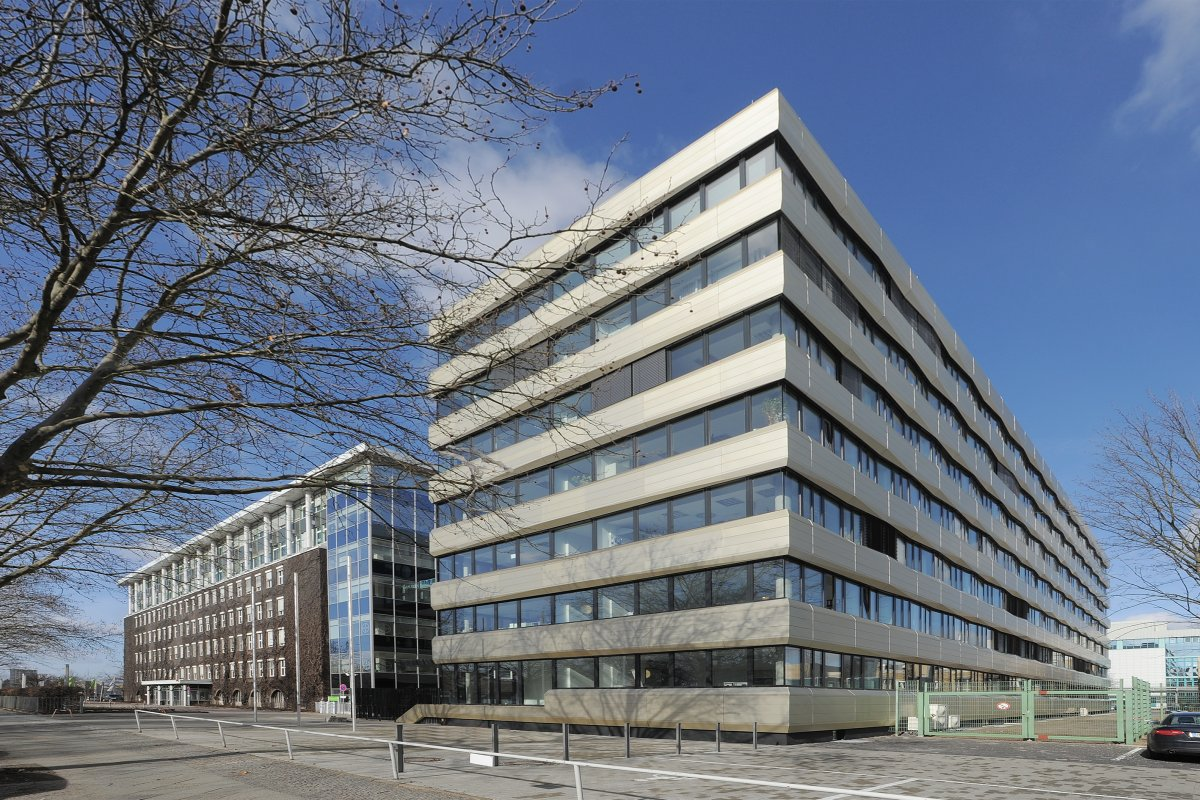 Laborgebäude und Bürogebäude